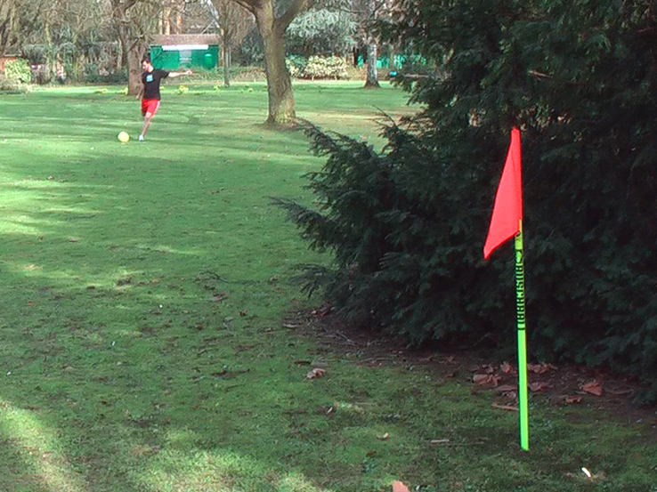 Ein Buschballspieler schießt im Rheinhauser Volkspark den Ball auf die "Pole", die (aus seiner Sicht) hinter einem Gebüsch steht.